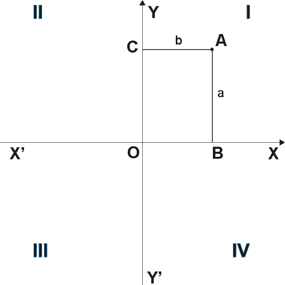 Двумерна декартова координатна система.